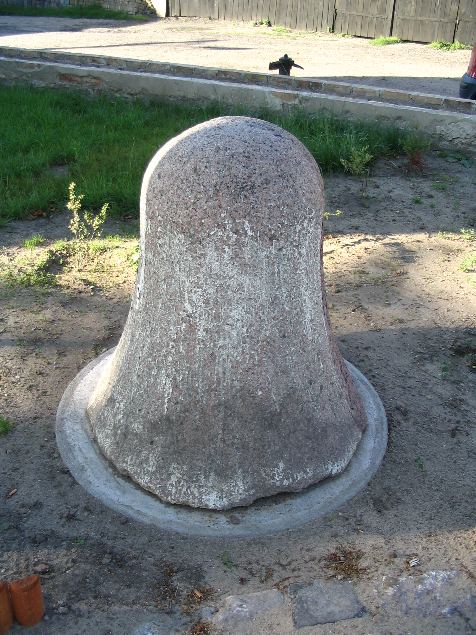 Zdjęcie znaku kamiennego oznaczającego milę pocztową (pruską). Autor: Wojciech Pośpiech